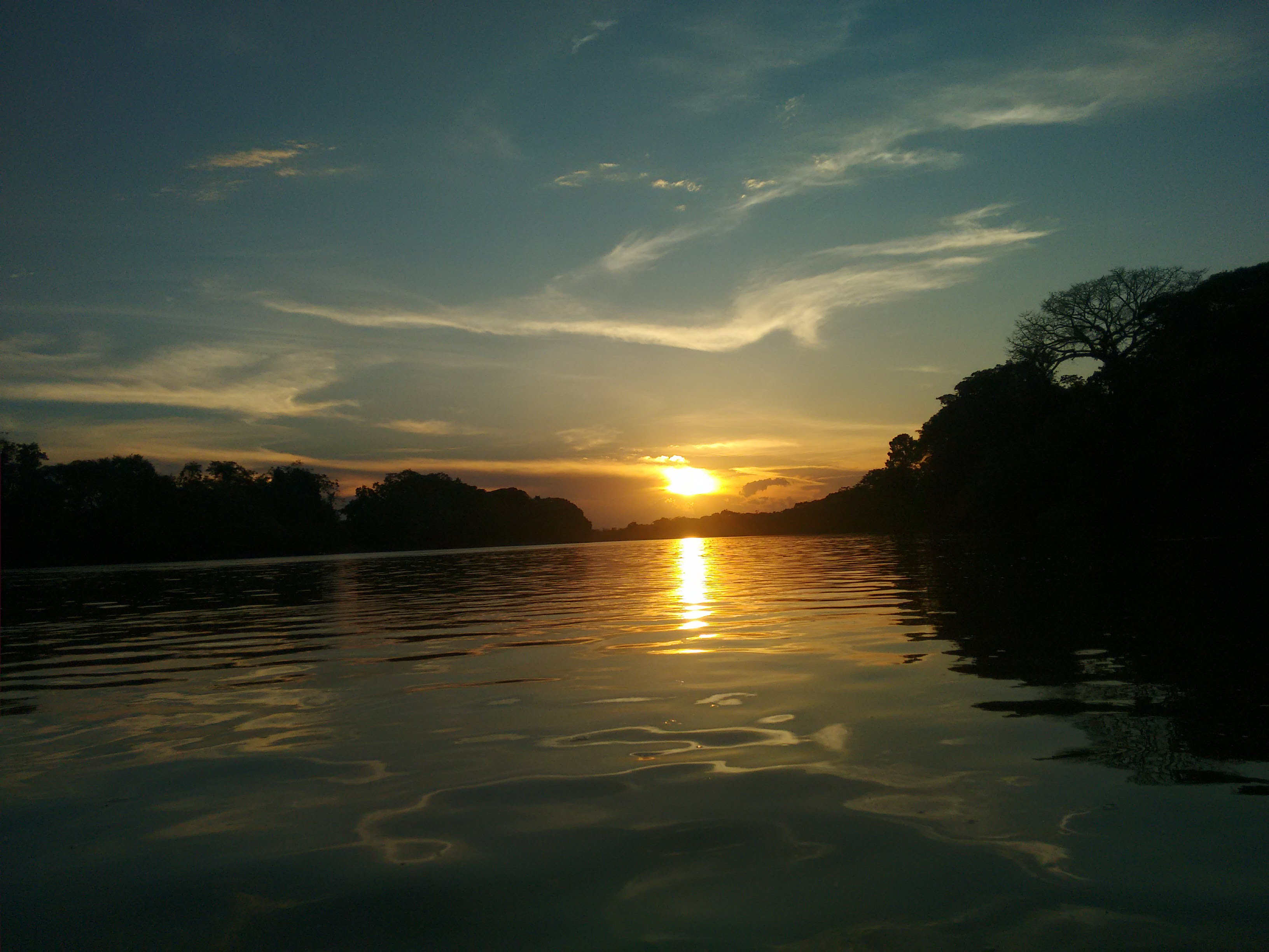 Esta fotografía fue tomada en el municipio colombiano con código 50350.